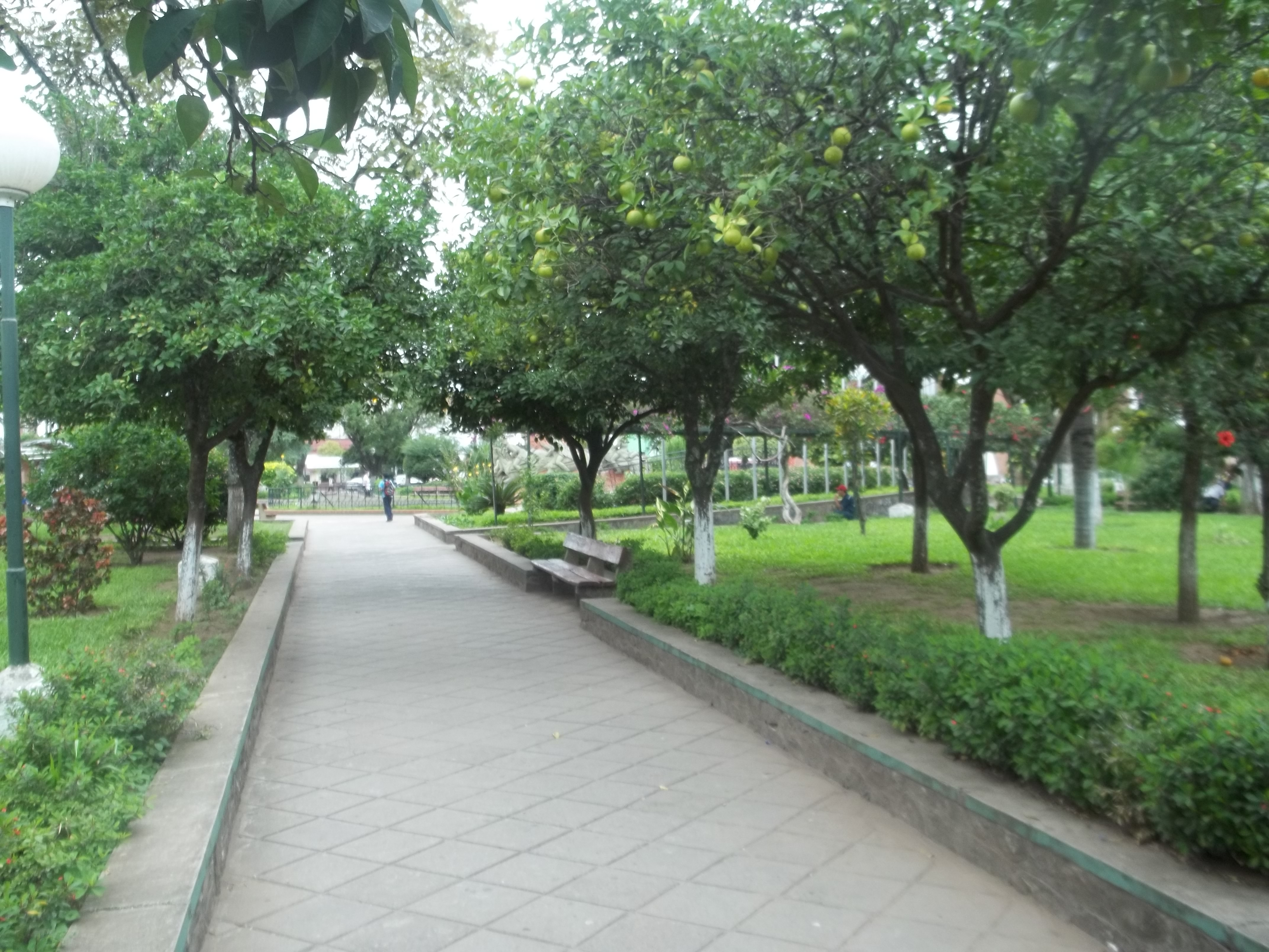 Plaza Libertador General San Martín en el centro de la ciudad homónima.